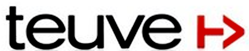 Logotipo de la empresa Teuve (Mediapark), antes de que fuese comprada por Chello Multicanal.